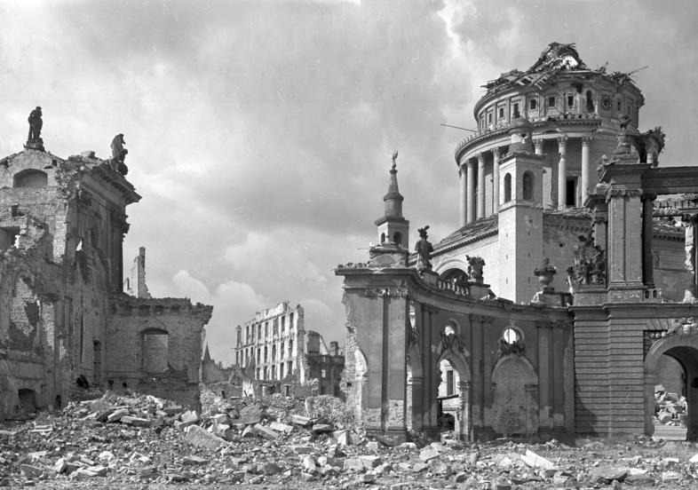 Potsdam.- Ruinen Nikolaikirche